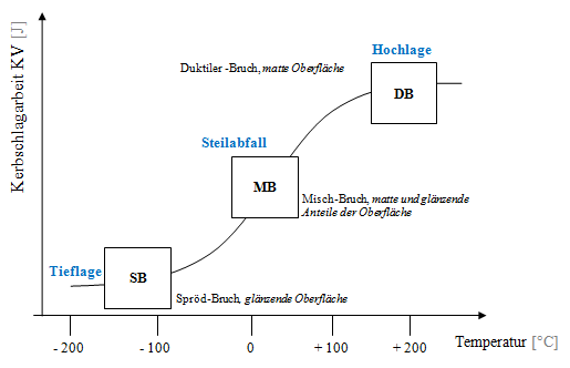 Schematische Darstellung der Kerbschlagarbeit in Abhängigkeit zur Temperatur von Stählen mit kubisch-raum-zentrierten Gitterstruktur und geringer Festigkeit. Mischbrüche treten in dem Temperaturbereich auf, in dem sich der Übergang vom Zähem zum spröden Bruchverhalten vollzieht, dem Steilabfall. Sie beginnen mit einer duktilen Anrissbildung und breiten sich, nach Erreichen der kritischen Risslänge, spaltartig aus. Kubisch-flächen-zentrierte und hexagonal-dichtest-gepackte Metalle mit geringer Festigkeit findet man in der Hochlage mit einer hohen Kerbschlagarbeit. Im Gegenzug dazu besitzen Werkstoffe mit einer hohen Festigkeit eine geringe Kerbschlagarbeit und befinden sich in der Tieflage.